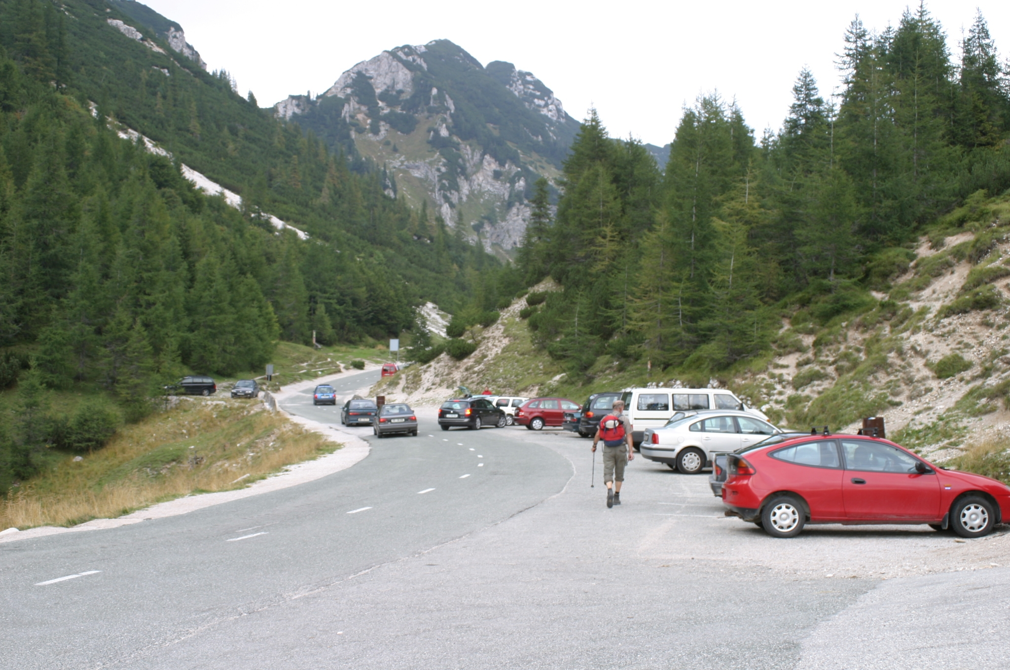 Prelaz_Vršič / Vršič pass - 1611 m